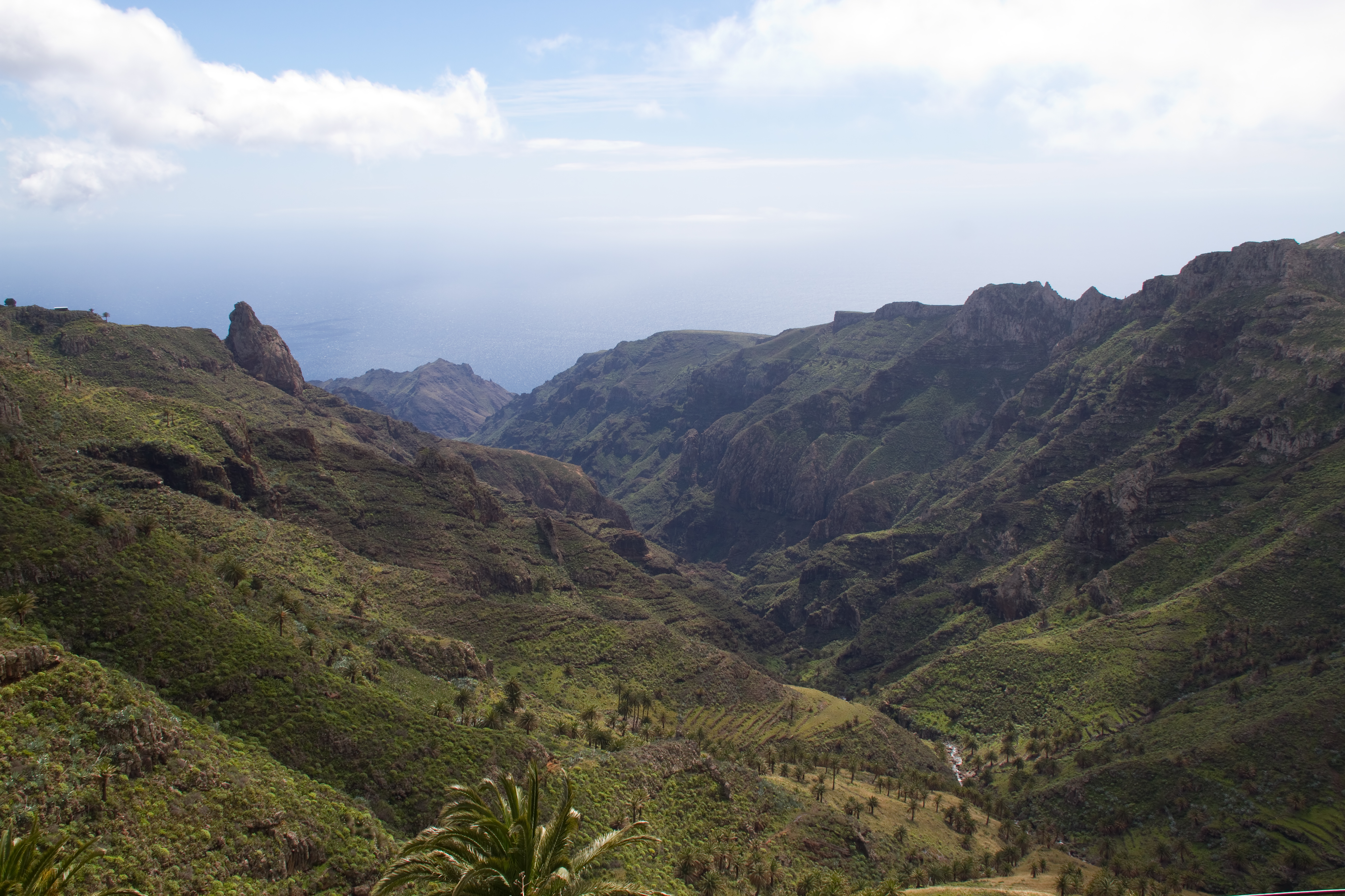 Valley La Gomera